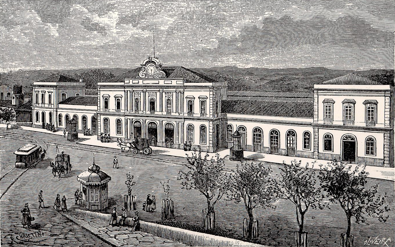 (zincogravura baseada em foto de) Emílio Biel